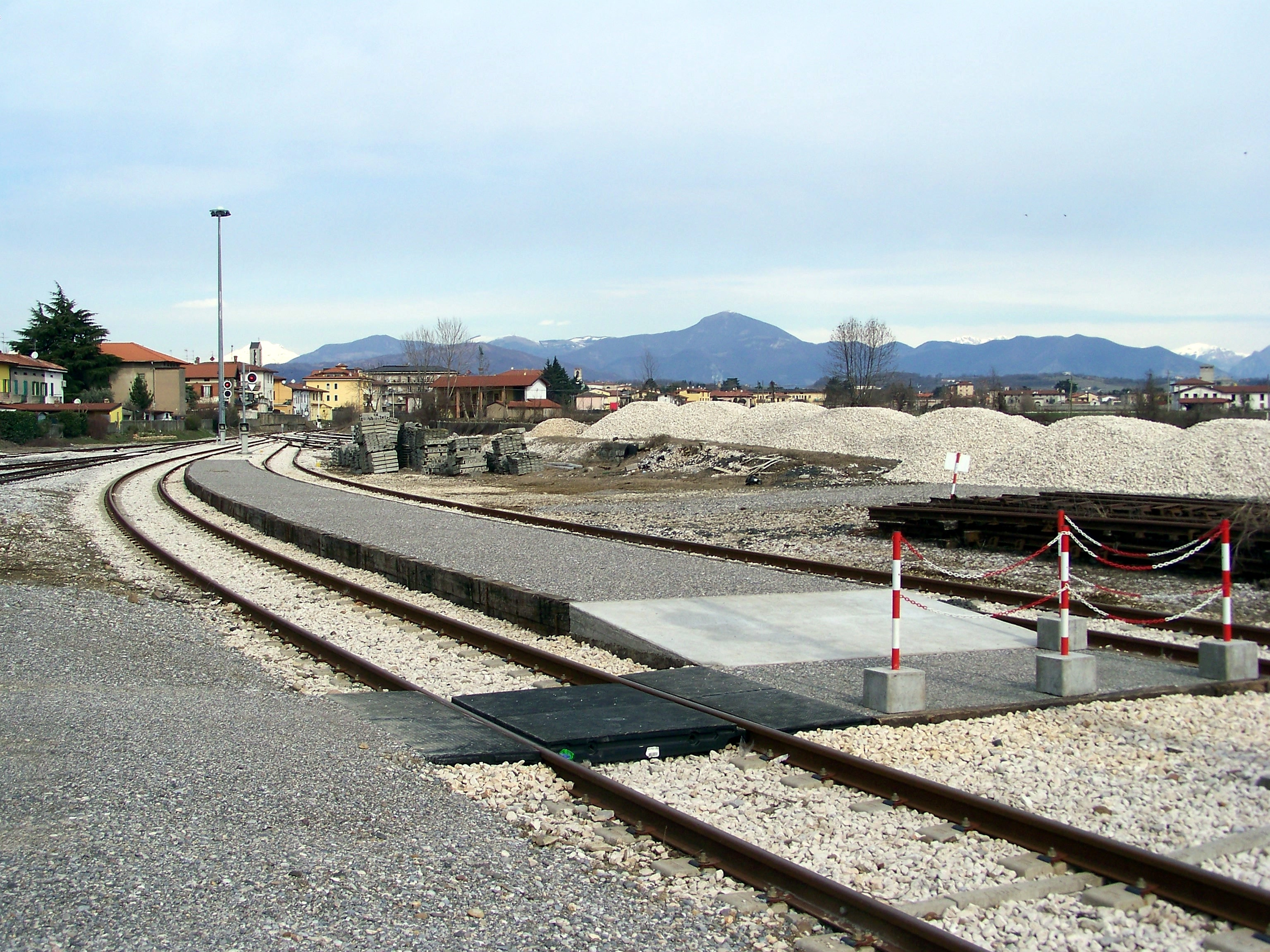 La nuova banchina della stazione di Rovato Borgo presso il raccordo con la stazione di Rovato RFI.